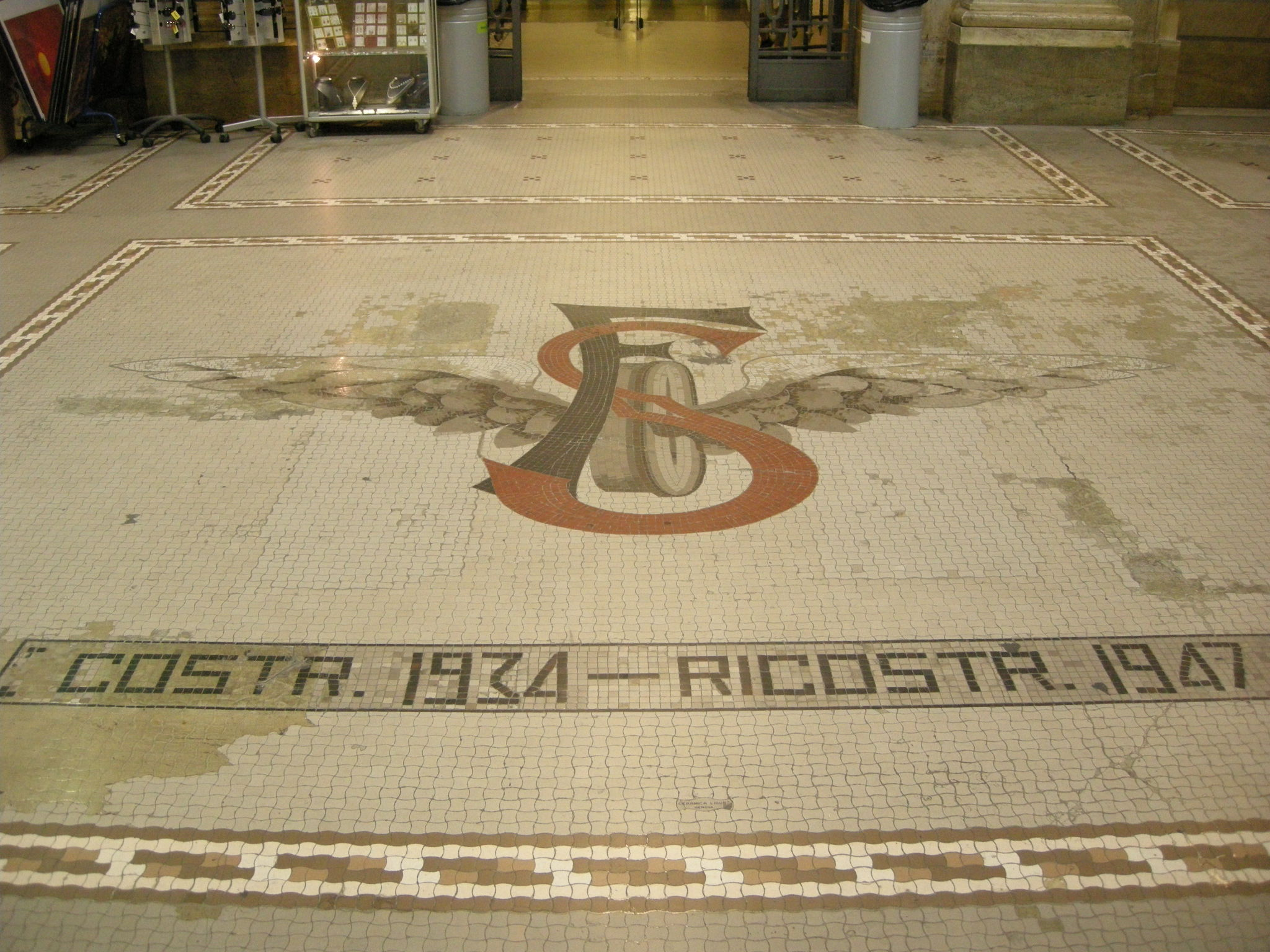 Stazione di prato centrale, sala biglietteria, pavimento